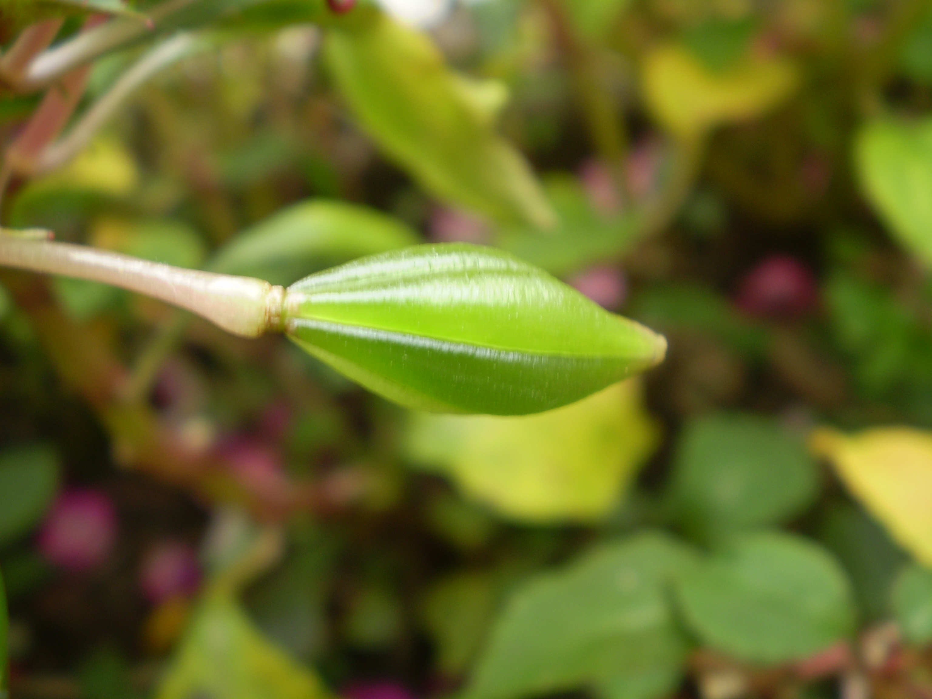 Buah kotak sejenis pacar air (Impatiens walleriana).